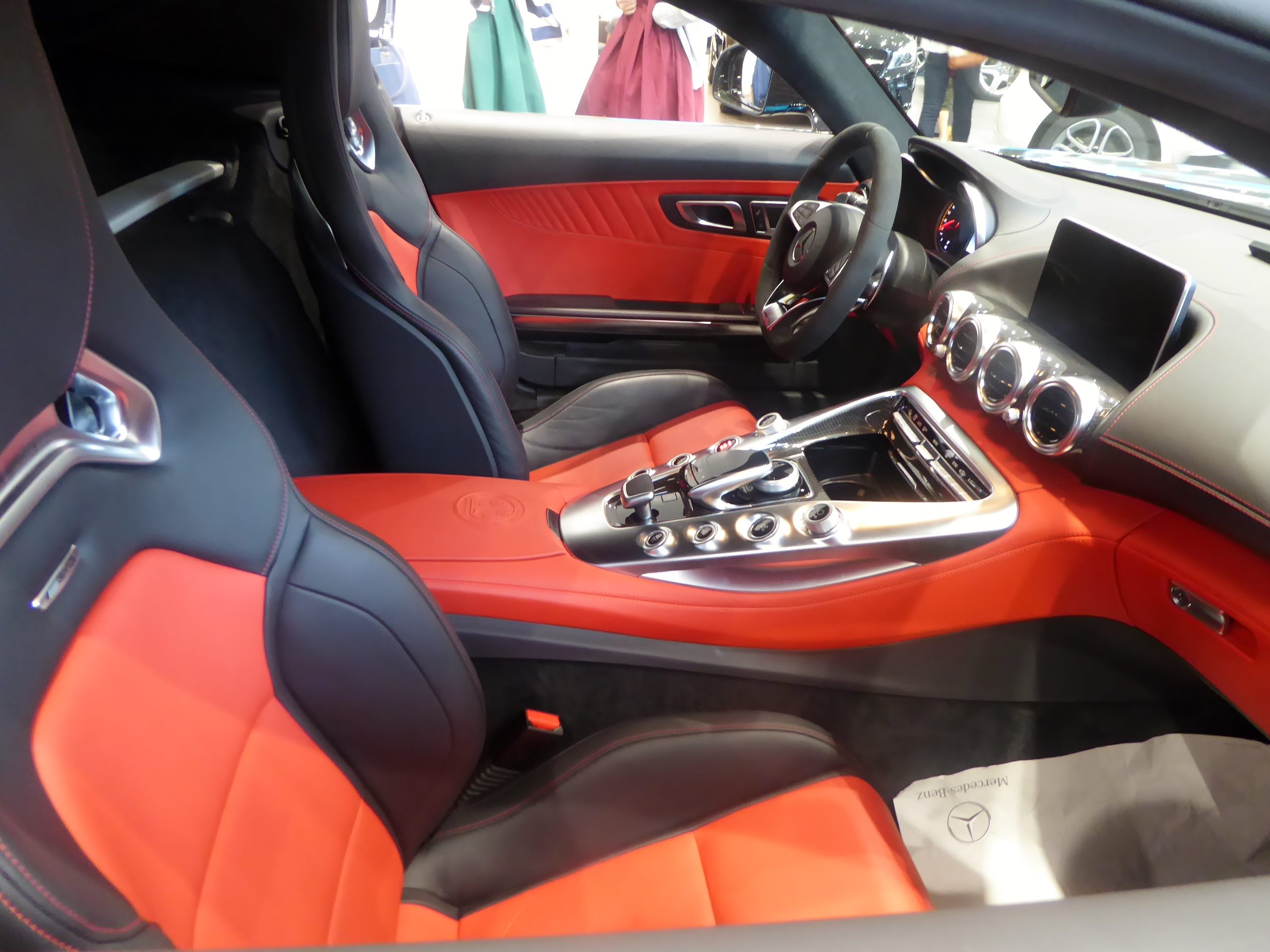 ネクストライドロンを撮影。